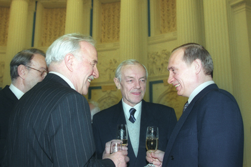 МОСКВА, КРЕМЛЬ. Церемония вручения премии Президента в области литературы и искусства за 1999 год и премии имени Булата Окуджавы. С известными актерами Михаилом Ульяновым, Алексеем Баталовым и Кириллом Лавровым.